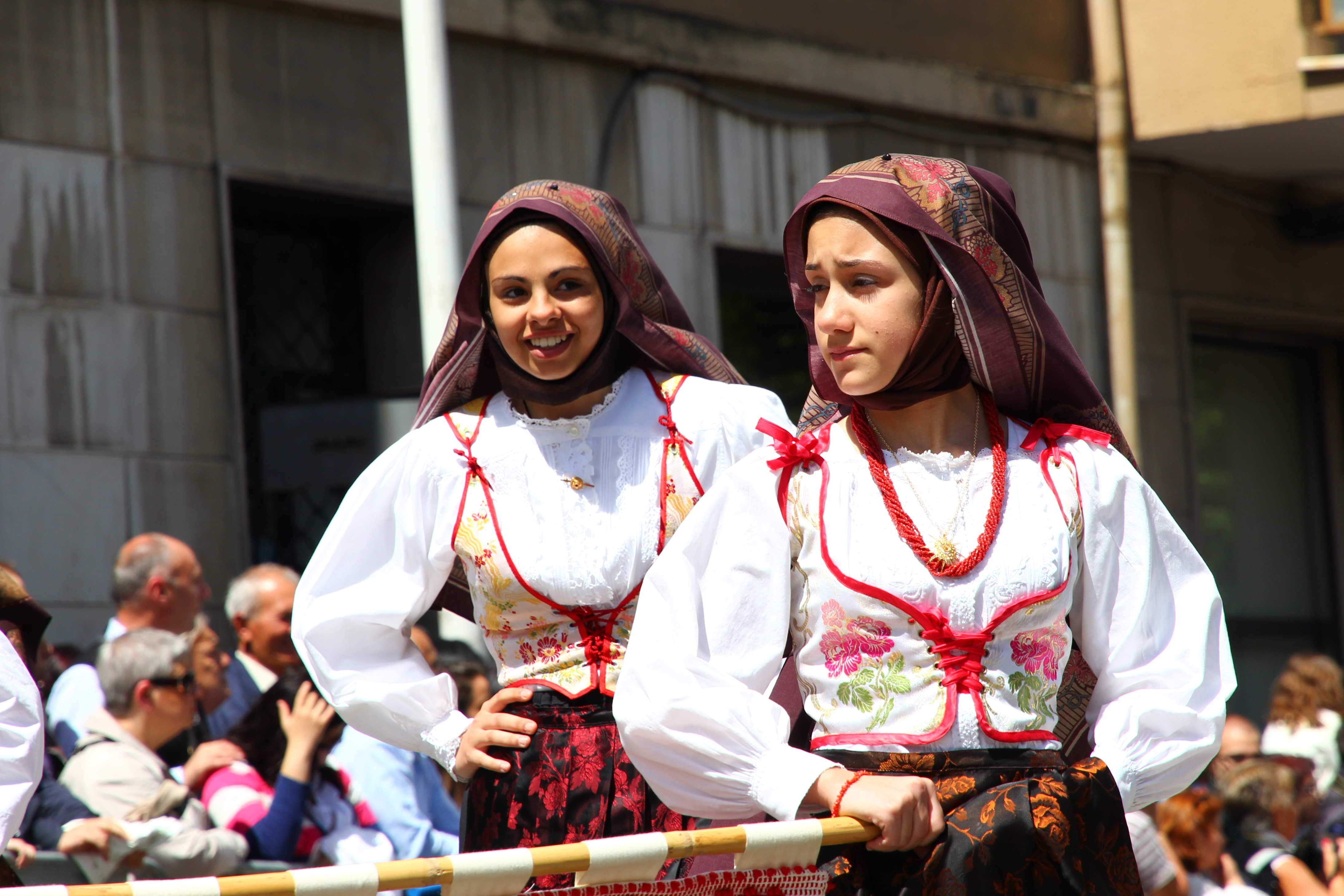 Cavalcata Sarda 2013 (Sassari)